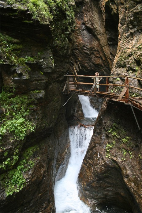 Naturschauspiel